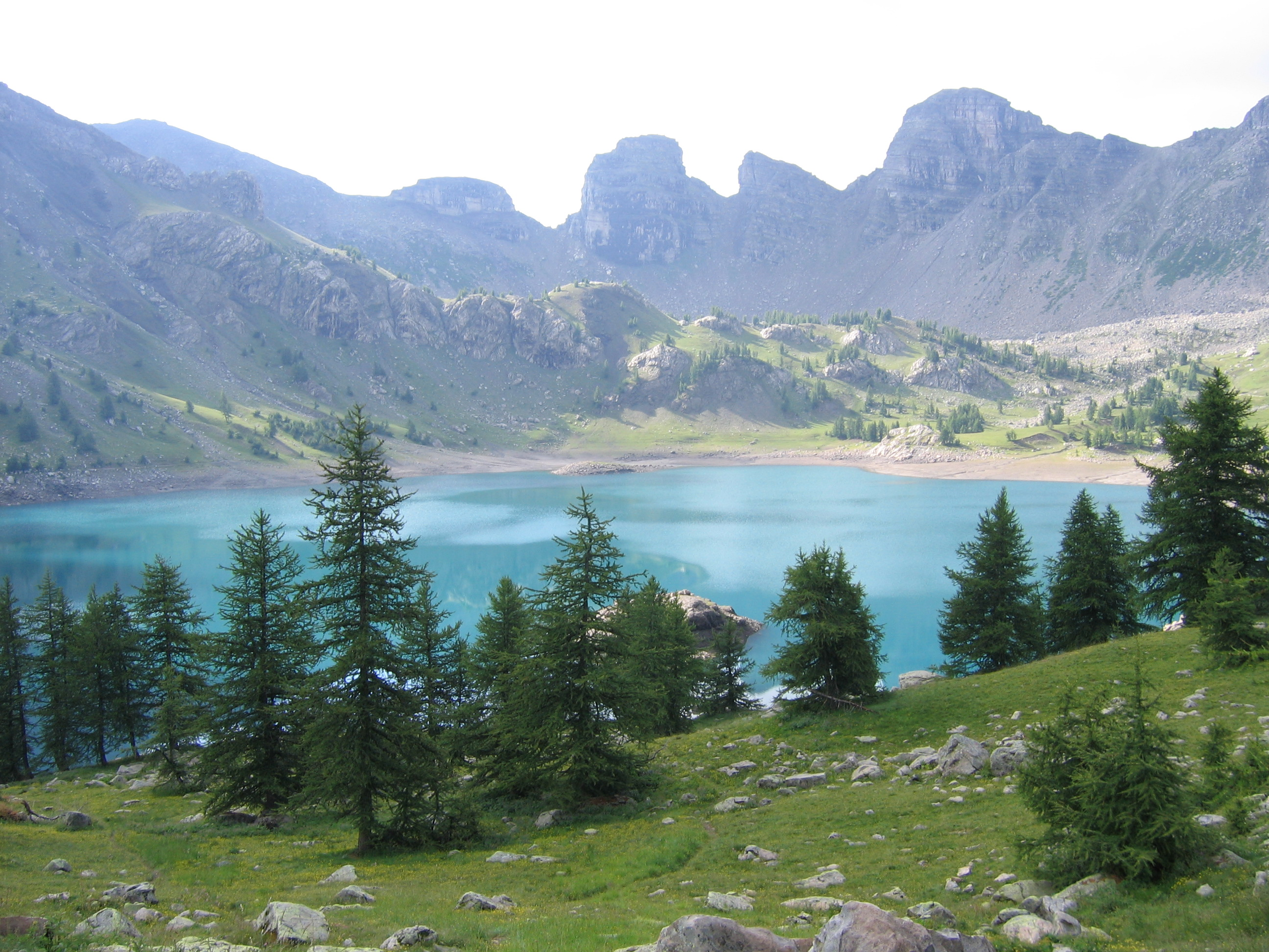 Lac d'Allos, avec Larix decidua